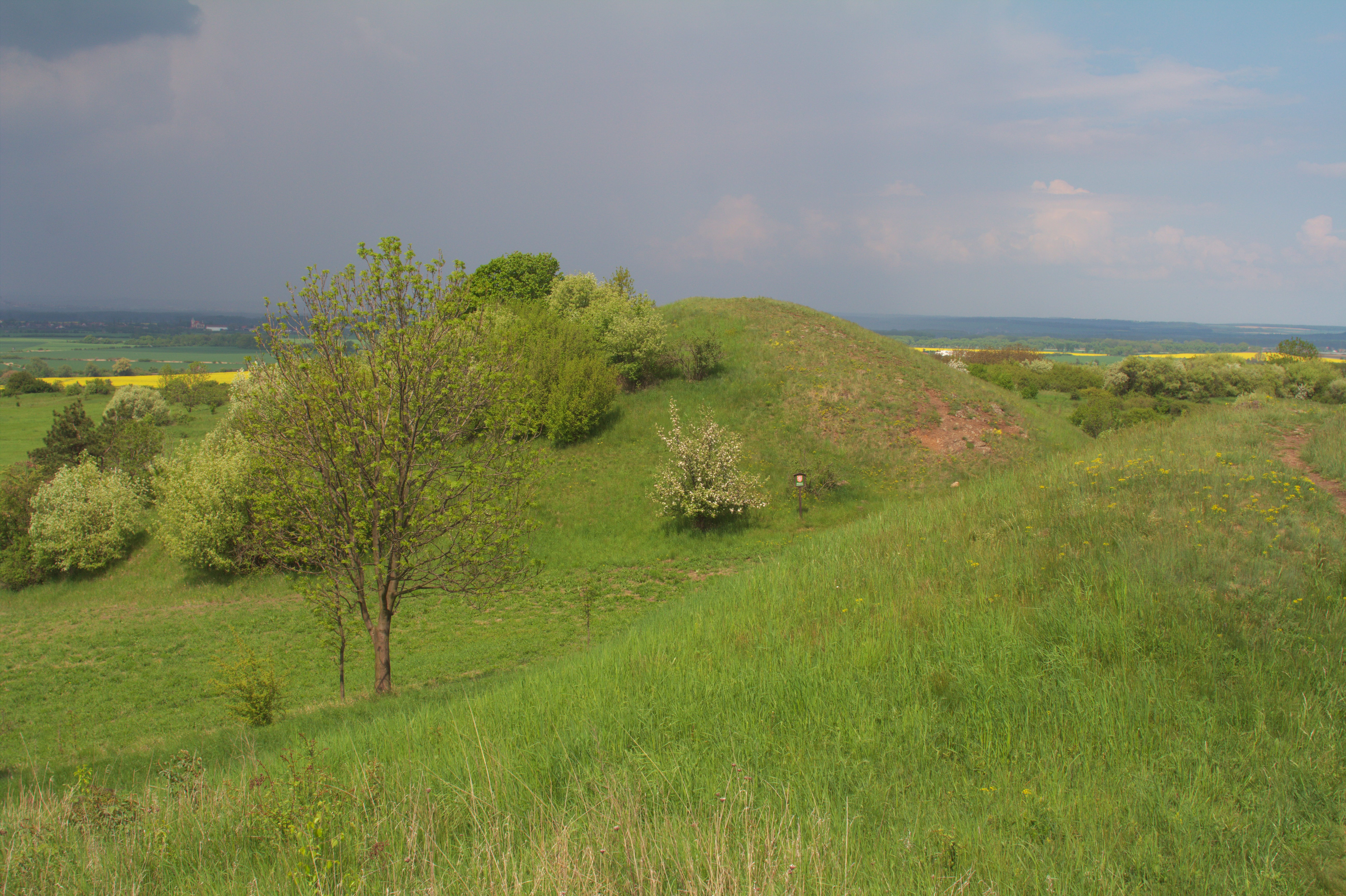 Kopeč (přírodní rezervace)